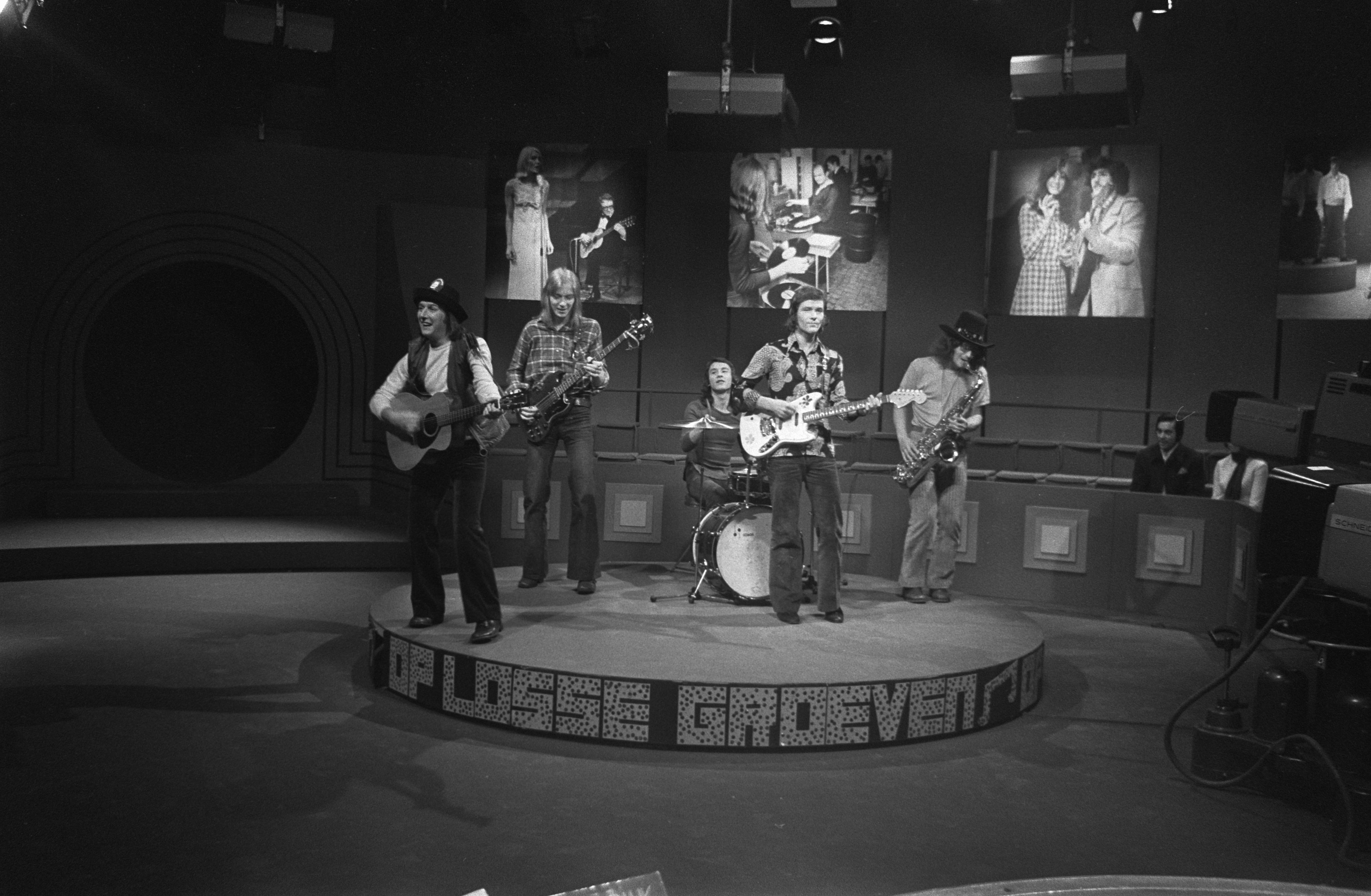 Peter en zijn Rockets in TROS' Op losse groeven, 7 december 1971